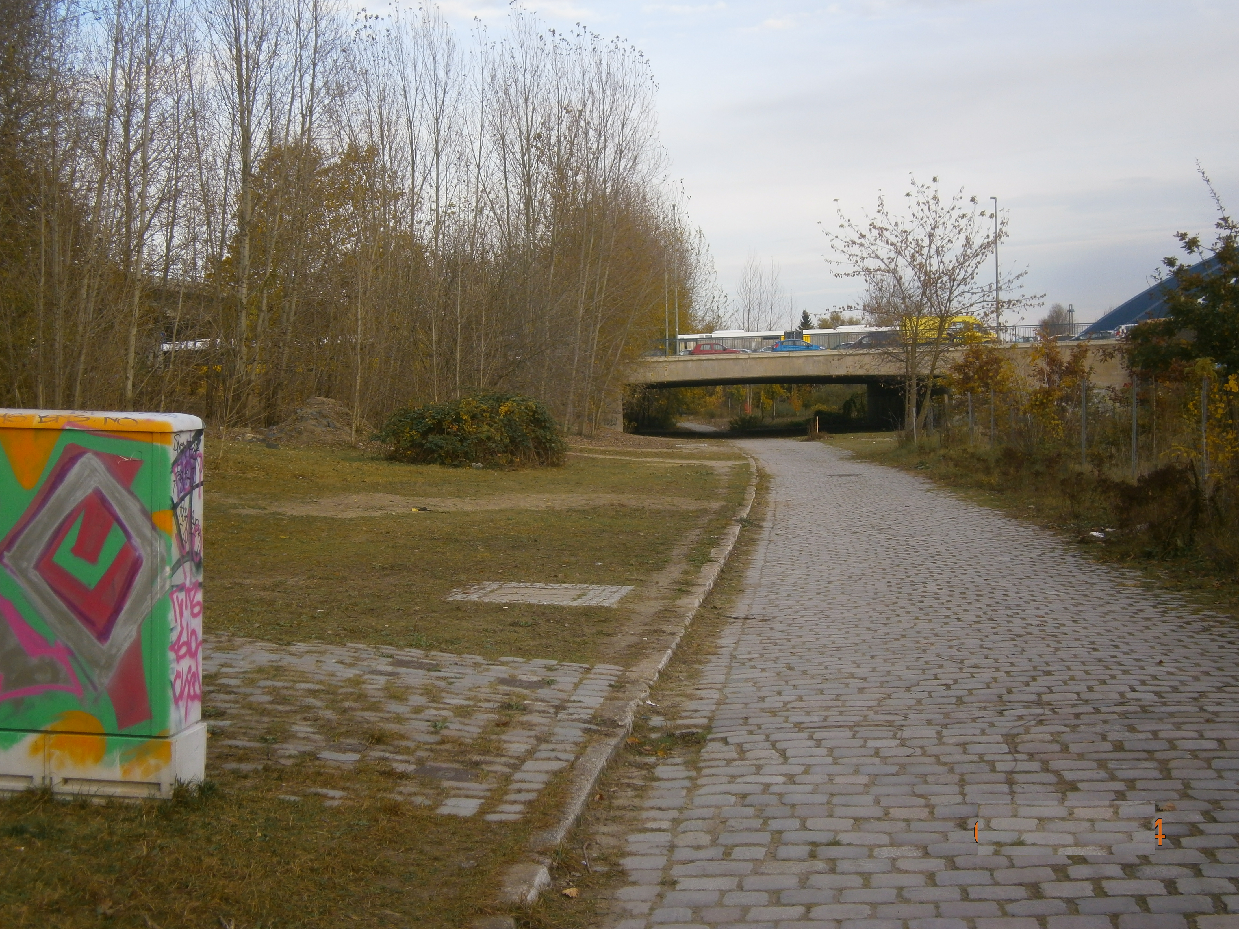 Nonnendamm ist eine Straße mit historischer Bedeutung zwischen Spandau und Charlottenburg. Ein Abschnitt (anschließend an Siemensstadt) liegt im Berliner Ortsteil Charlottenburg-Nord des Bezirks Charlottenburg-Wilmersdorf. Dieser Abschnitt führt auf die Schleuseninsel (Schleuse Charlottenburg) an der Spree. Der Verlauf der Straße wurde durch den Bau der Neuen Schleuse Charlottenburg unterbrochen und so endet die Straße nunmehr an der Ortsteilgrenze zu Charlottenburg. Der weitere vormalige Verlauf nach Osten jenseit der Neuen Schleuse ist entwidmet. Lässt sich allerdings im Verlauf von Straßenbelag noch finden.